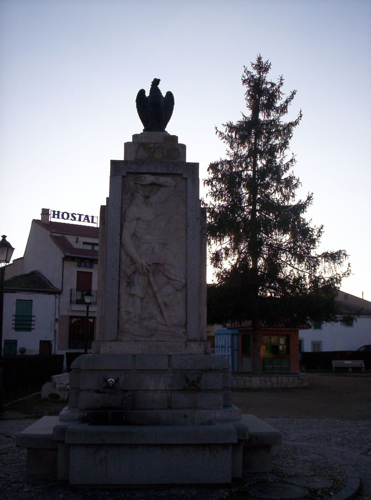 Fuente con esculturas de Florentino Trapero (águila de bronce en bulto redondo, y relieves en piedra de un segador y un resinero; las bocas de agua son piñas de bronce). Plaza de Aguilafuente (Segovia)